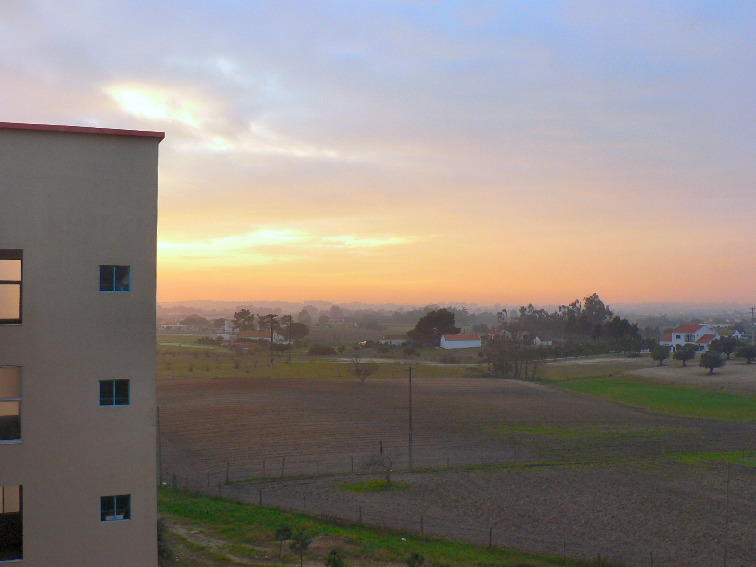 Vista de Pinhal Novo, Palmela, Setúbal